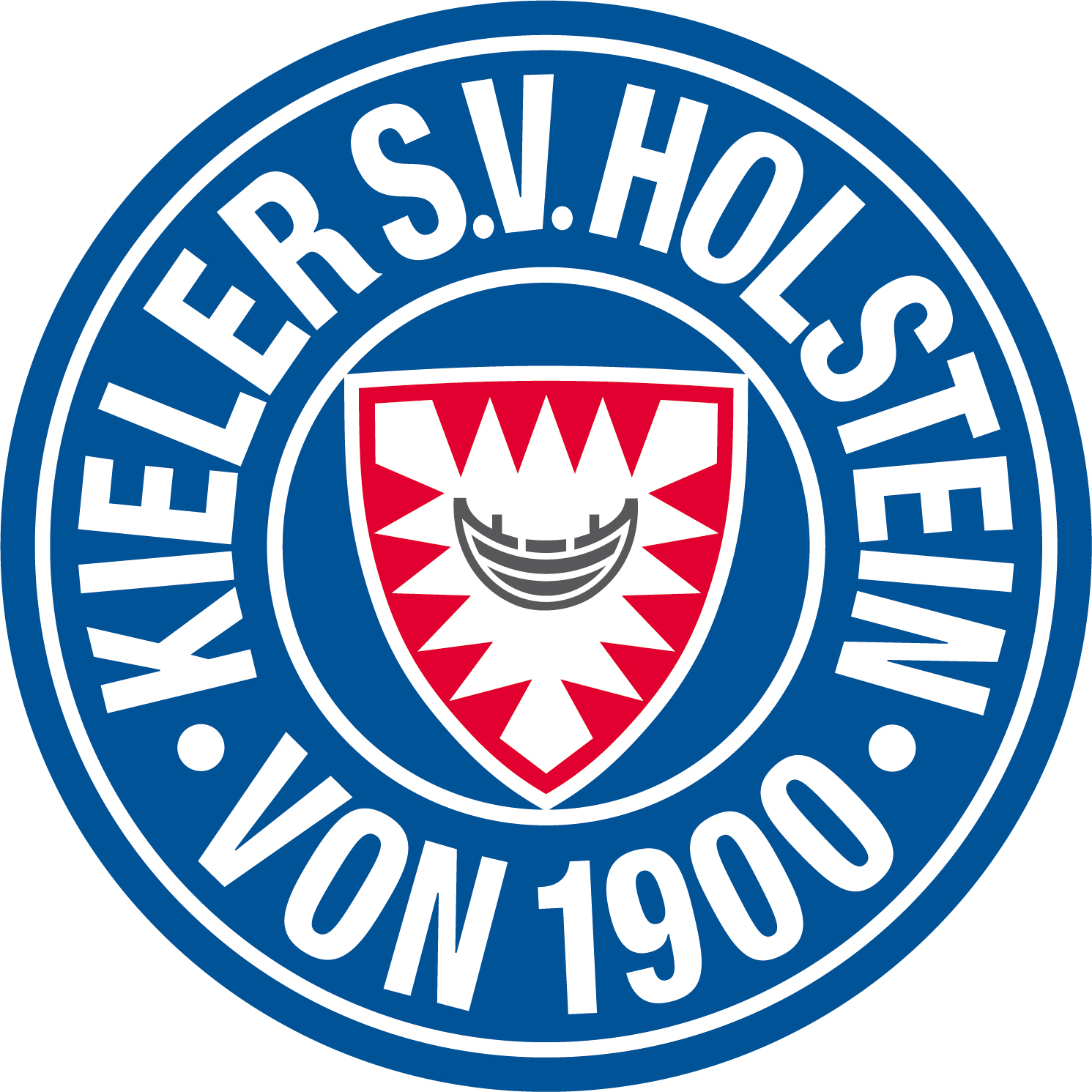 Das neue Logo der KSV Holstein seit 2017